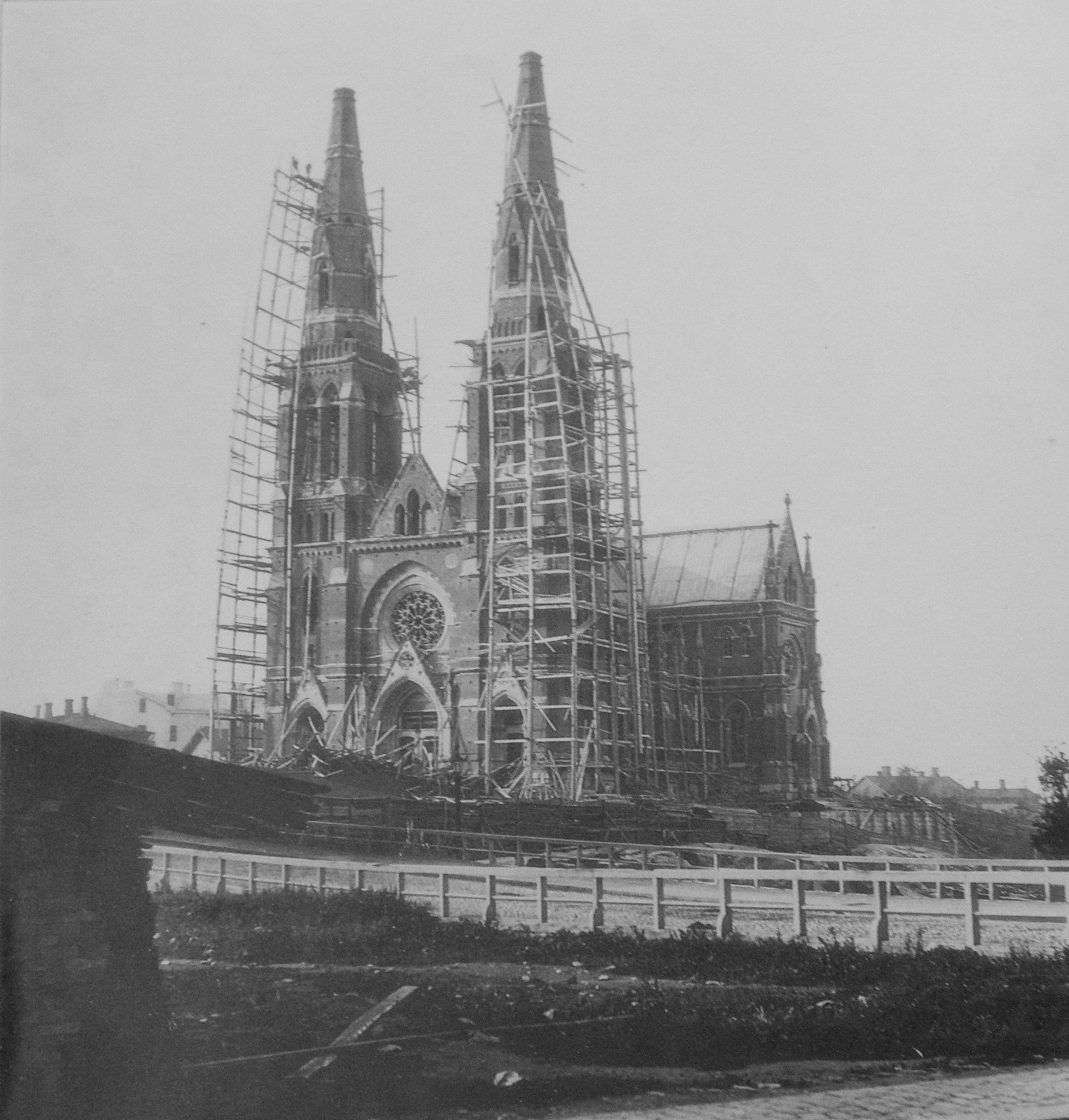 Johanneksen kirkko rakenteilla vuonna 1890 Helsingissä.